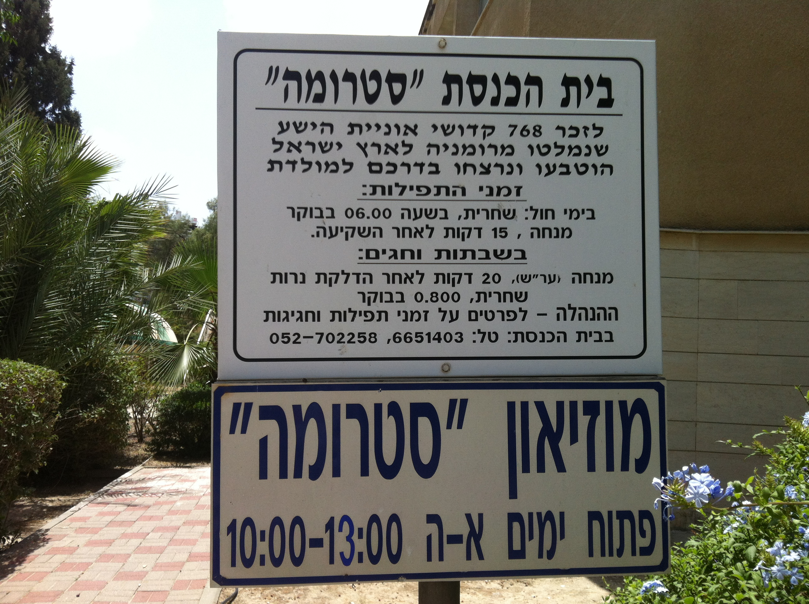 כניסה למוזיאון סטרומה 2015